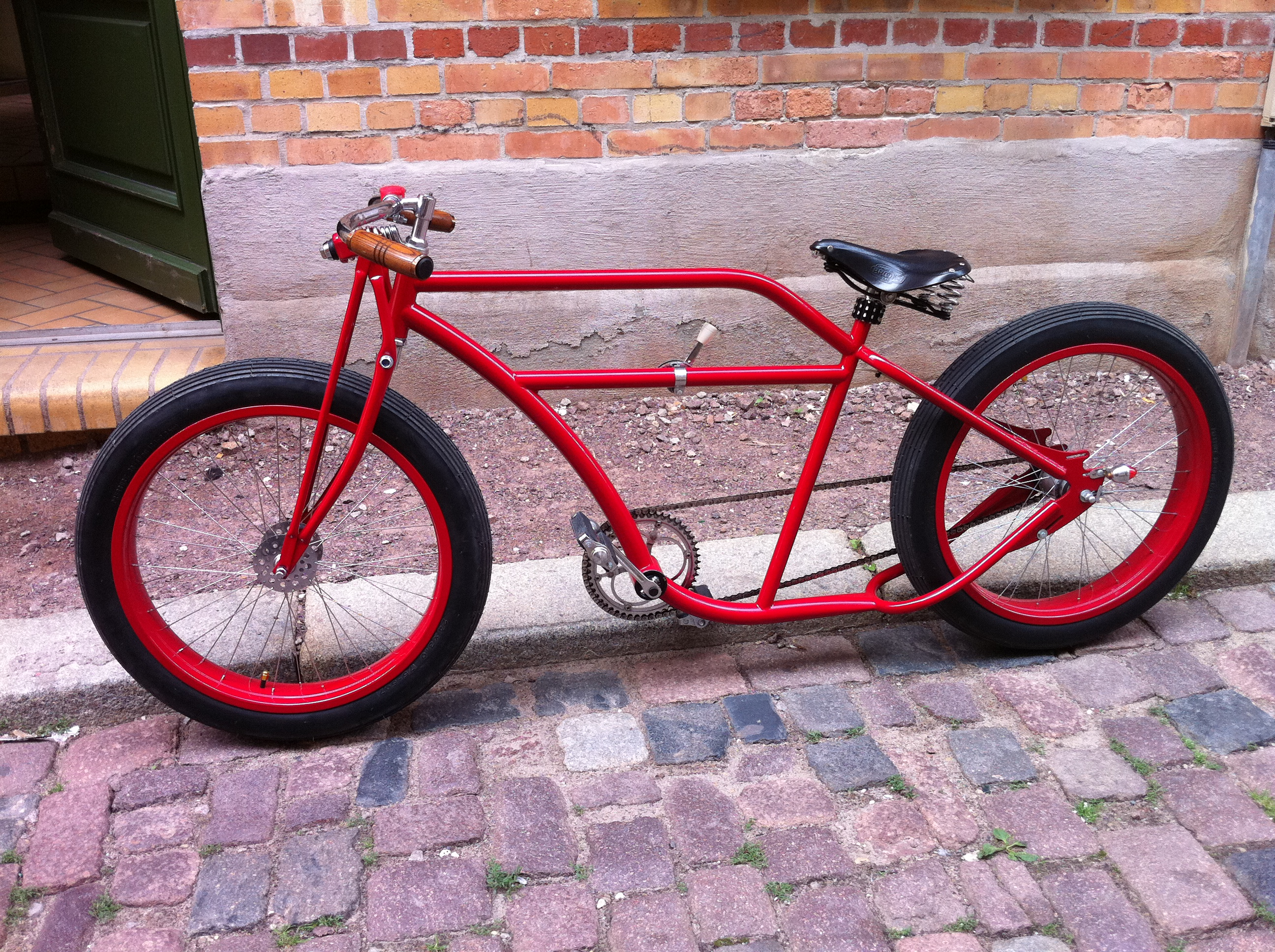 Custombikeaufbau eines Ruff Cycles "Porucho" Rahmens